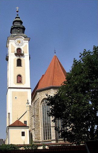 Stadtpfarrkirche Eferding